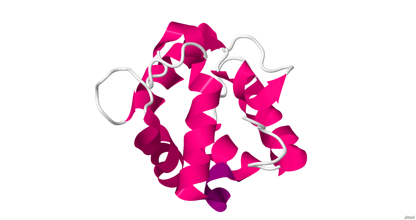 Human alpha parvalbumin